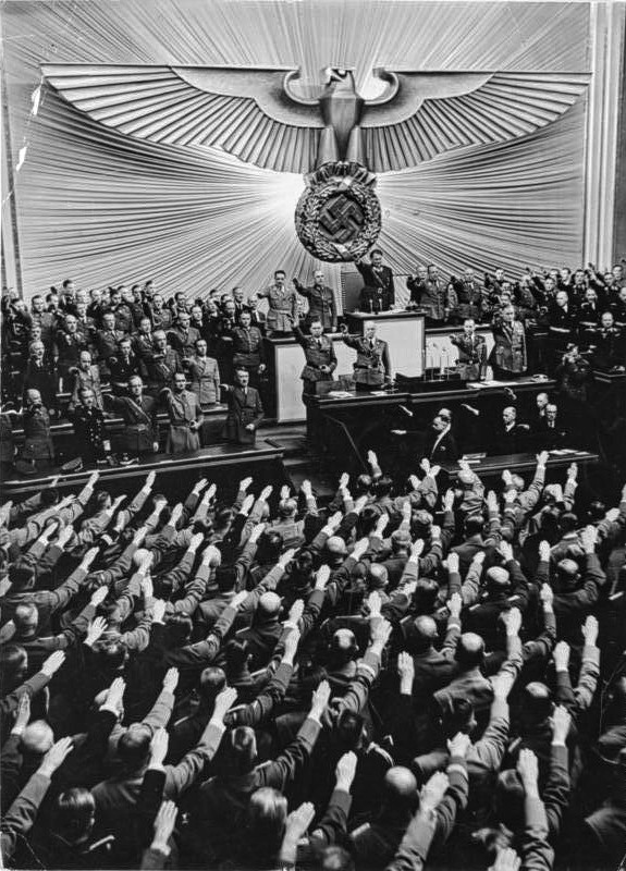 Berlin, Reichstagssitzung, Adolf Hitler Berlin.- Reichstagssitzung, Adolf Hitler und NS-Führung beim Hitler-Gruß; Historische Reichstagssitzung am 19. Juli 1940 Abgebildete Personen: Hitler, Adolf: Reichskanzler, Deutschland